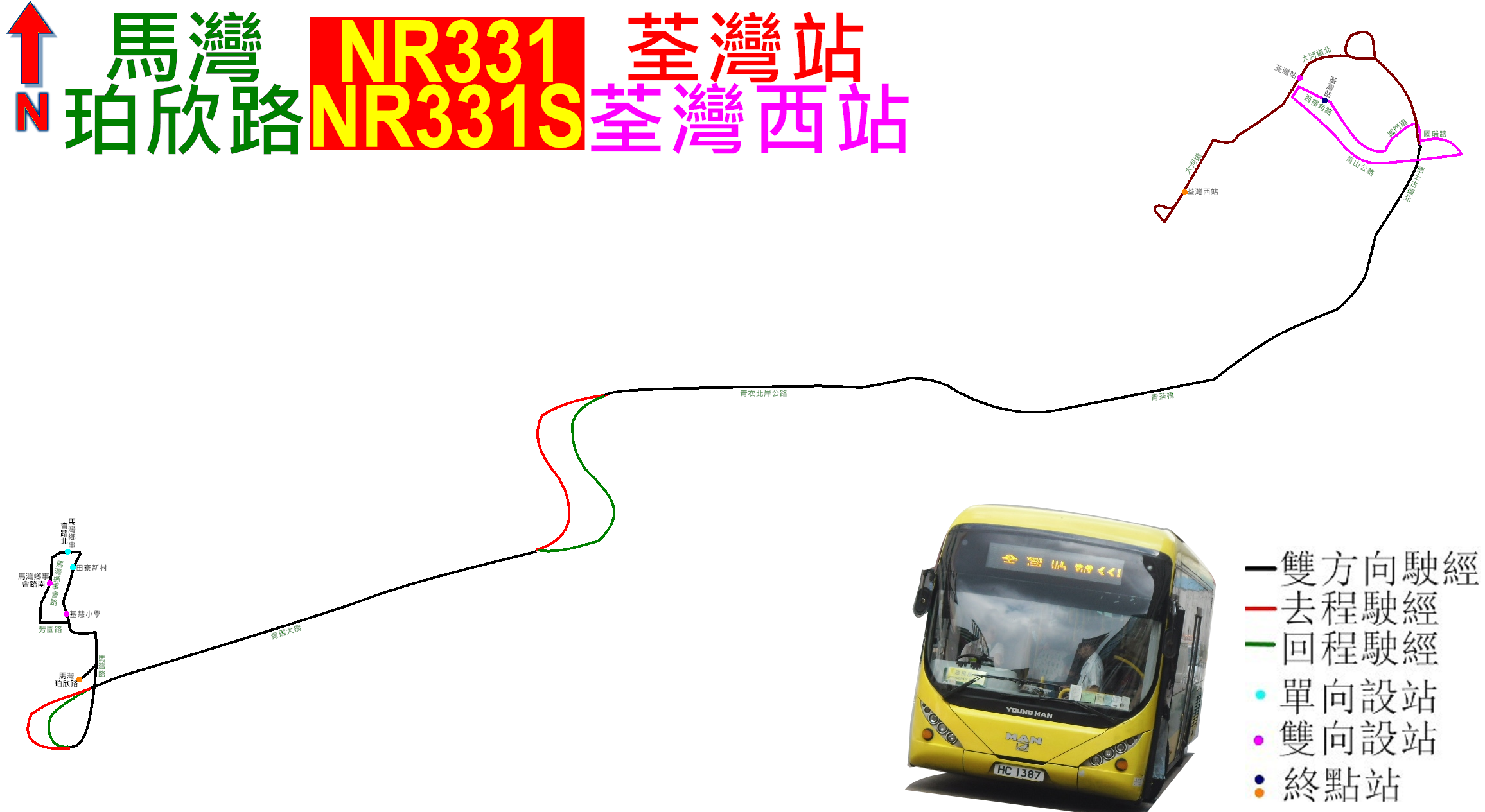 中文（香港）: 珀麗灣巴士NR331系列路線的走線圖